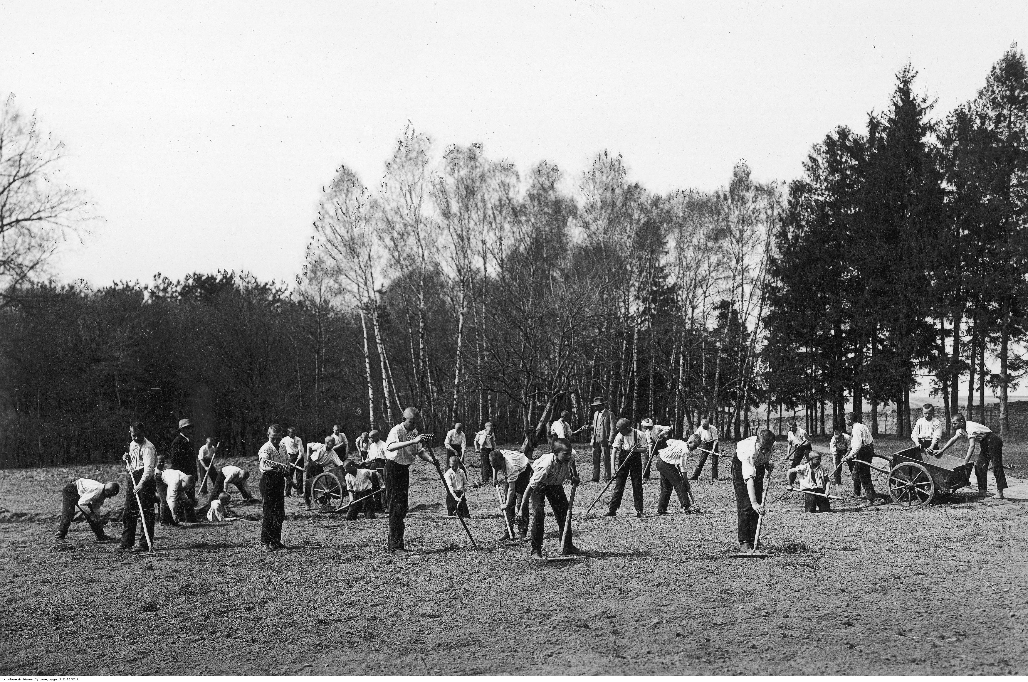 Zakład Sierot i Ubogich w Drohowyżu (1934) prace polowe